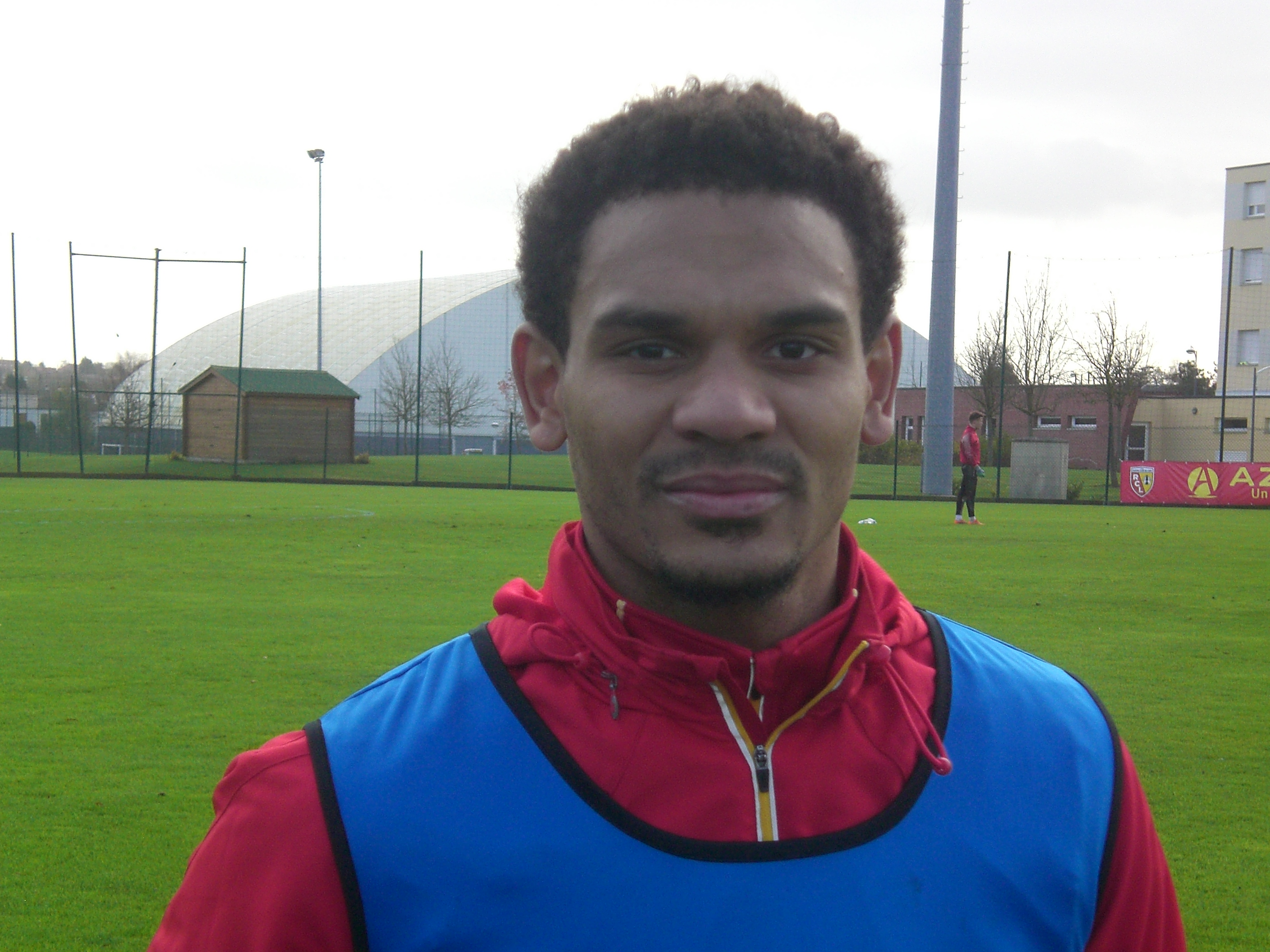 Kenny Lala après un entraînement public du Racing Club de Lens, le 18 novembre 2015, sur le Stade San Siro, du Complexe Sportif de La Gaillette, à Avion.